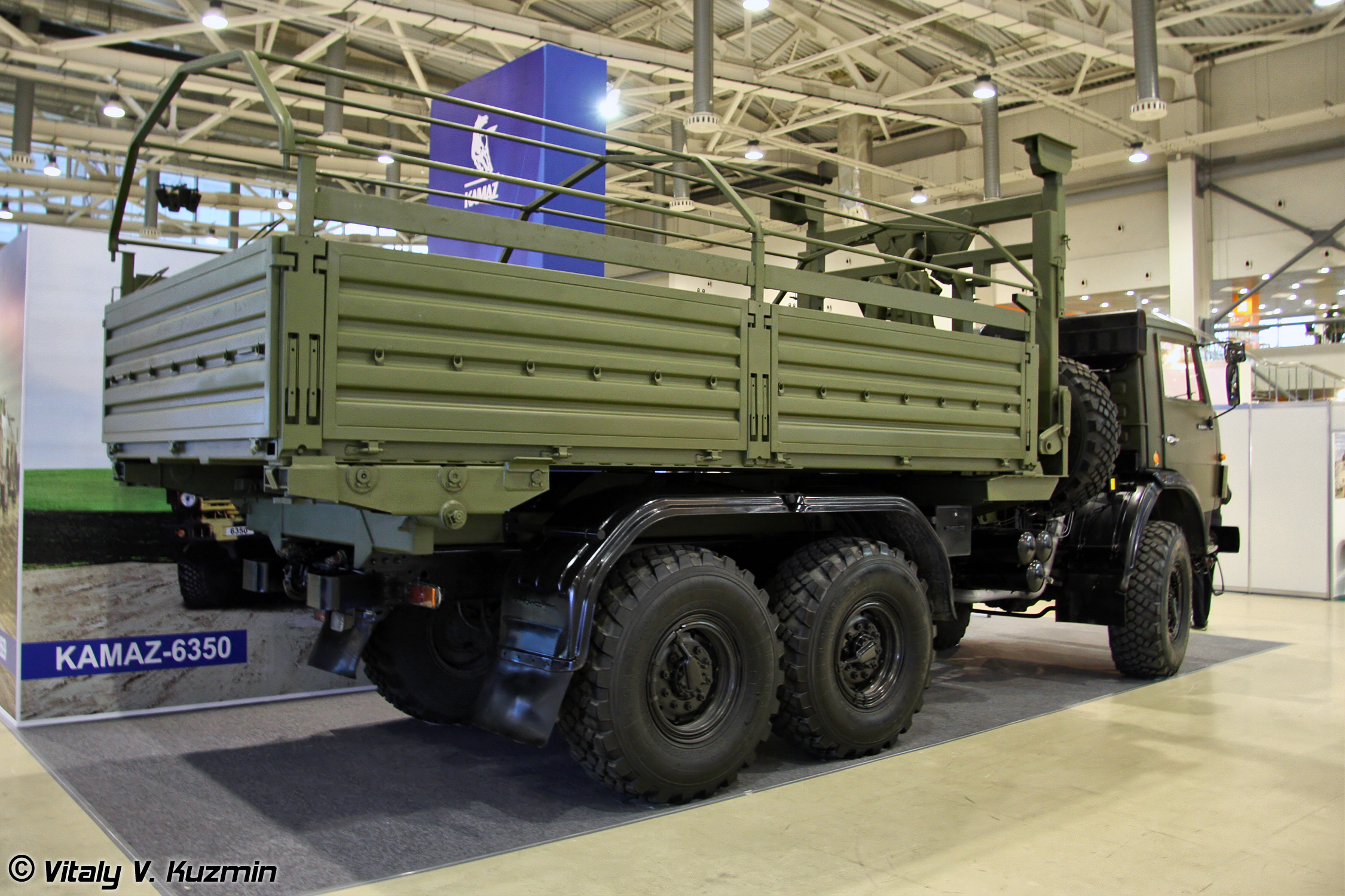 Автомобиль ЛДС-7927 с системой самопогрузки мультилифт МЛ6 на шасси КАМАЗ-53501 (Self-loading vehicle LDS-7927 with multilift on KAMAZ-53501 chassis)